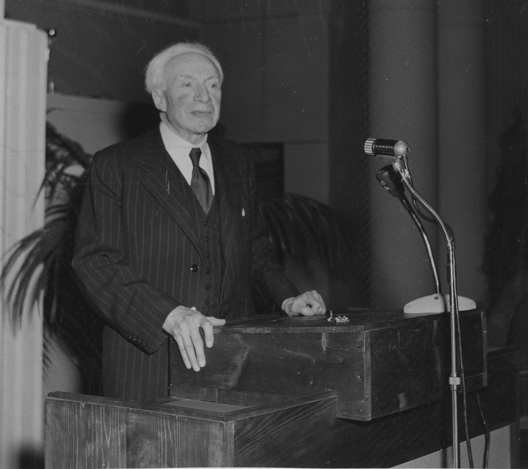 L'homme politique, juriste et économiste français Edgard Milhaud -1873-1964) au congrès de Genève du CIRIEC, 1953